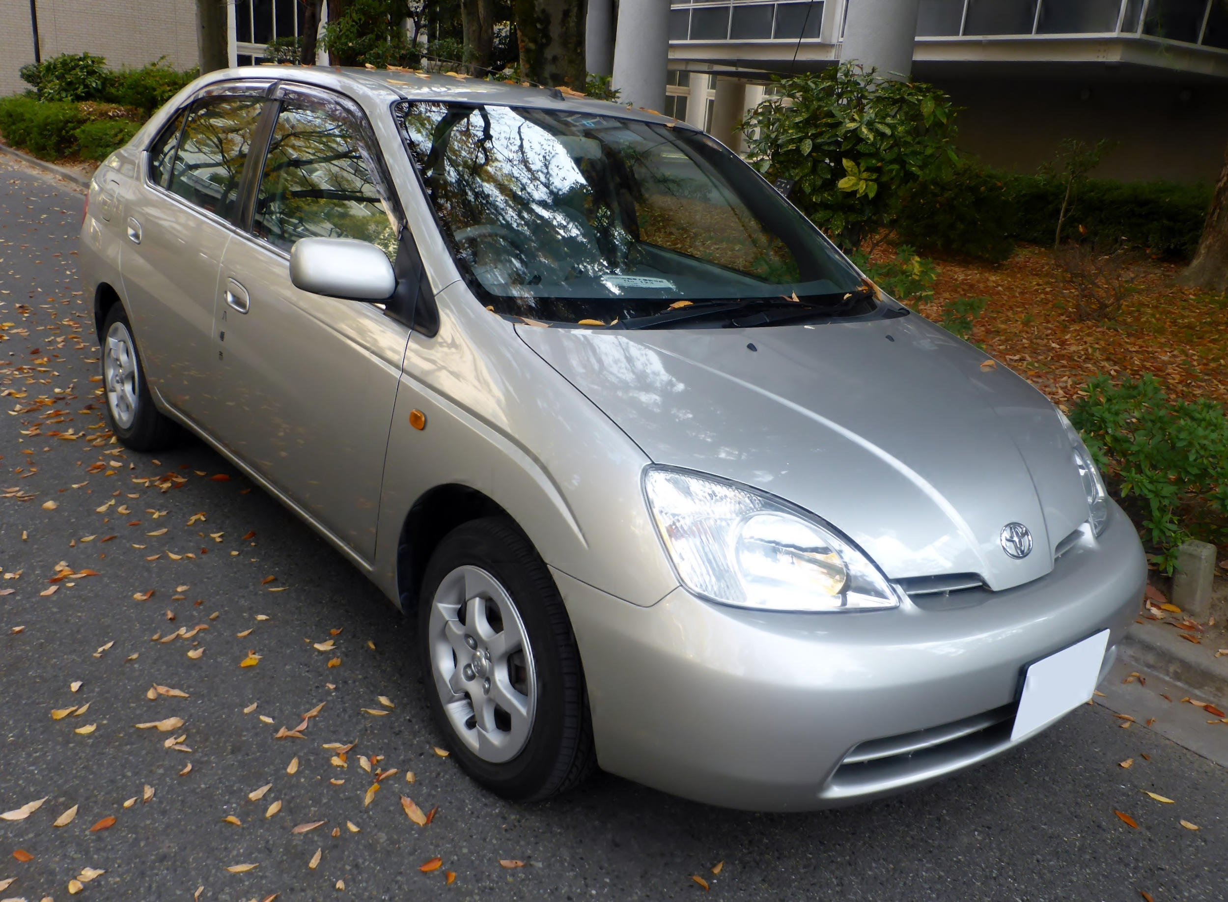 NHW10型トヨタ・プリウスをフロントから撮影。